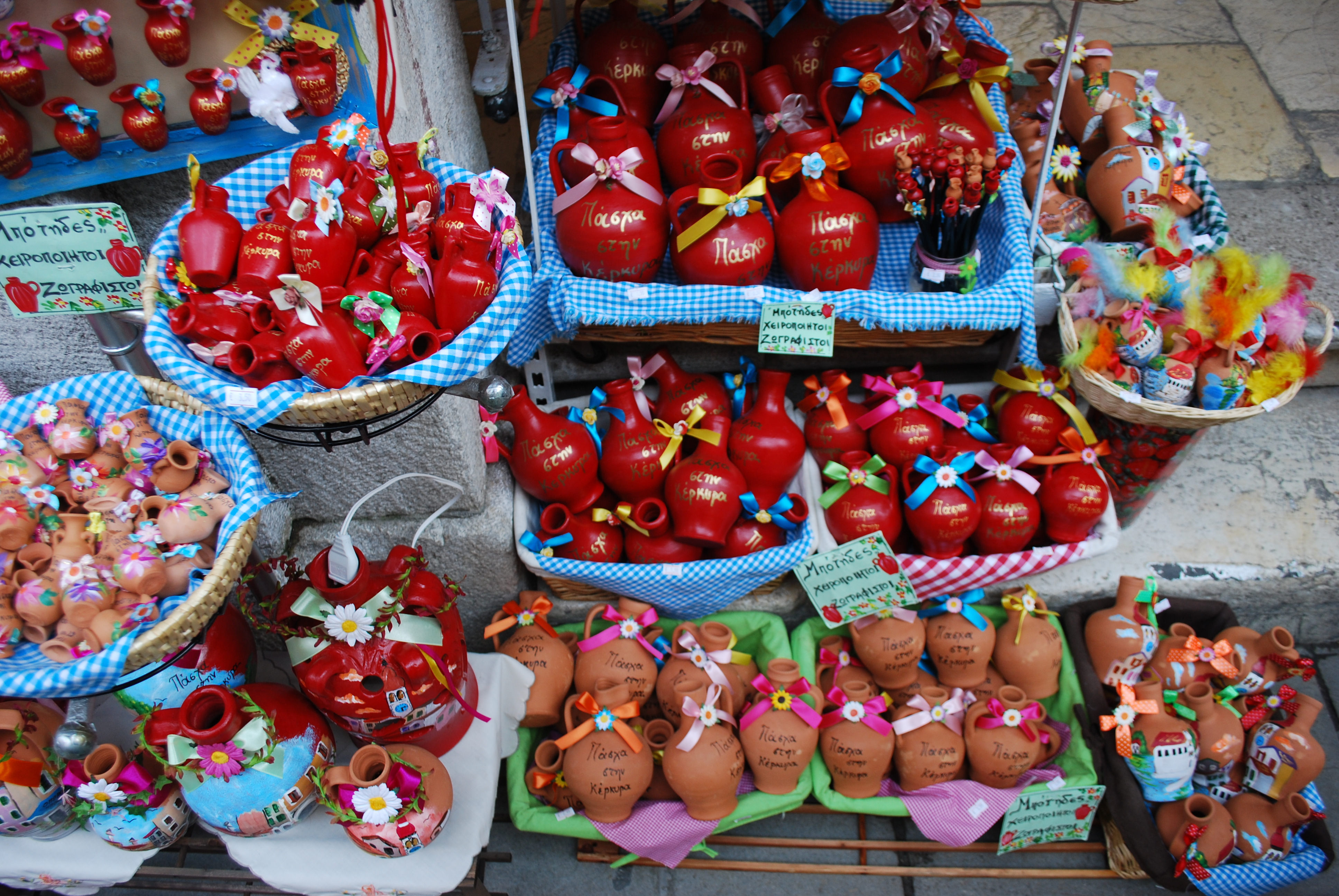 Vue de la ville de Corfou.